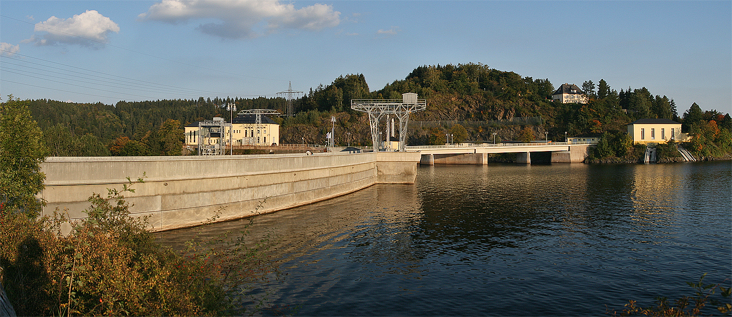 Bleichlochtalsperre